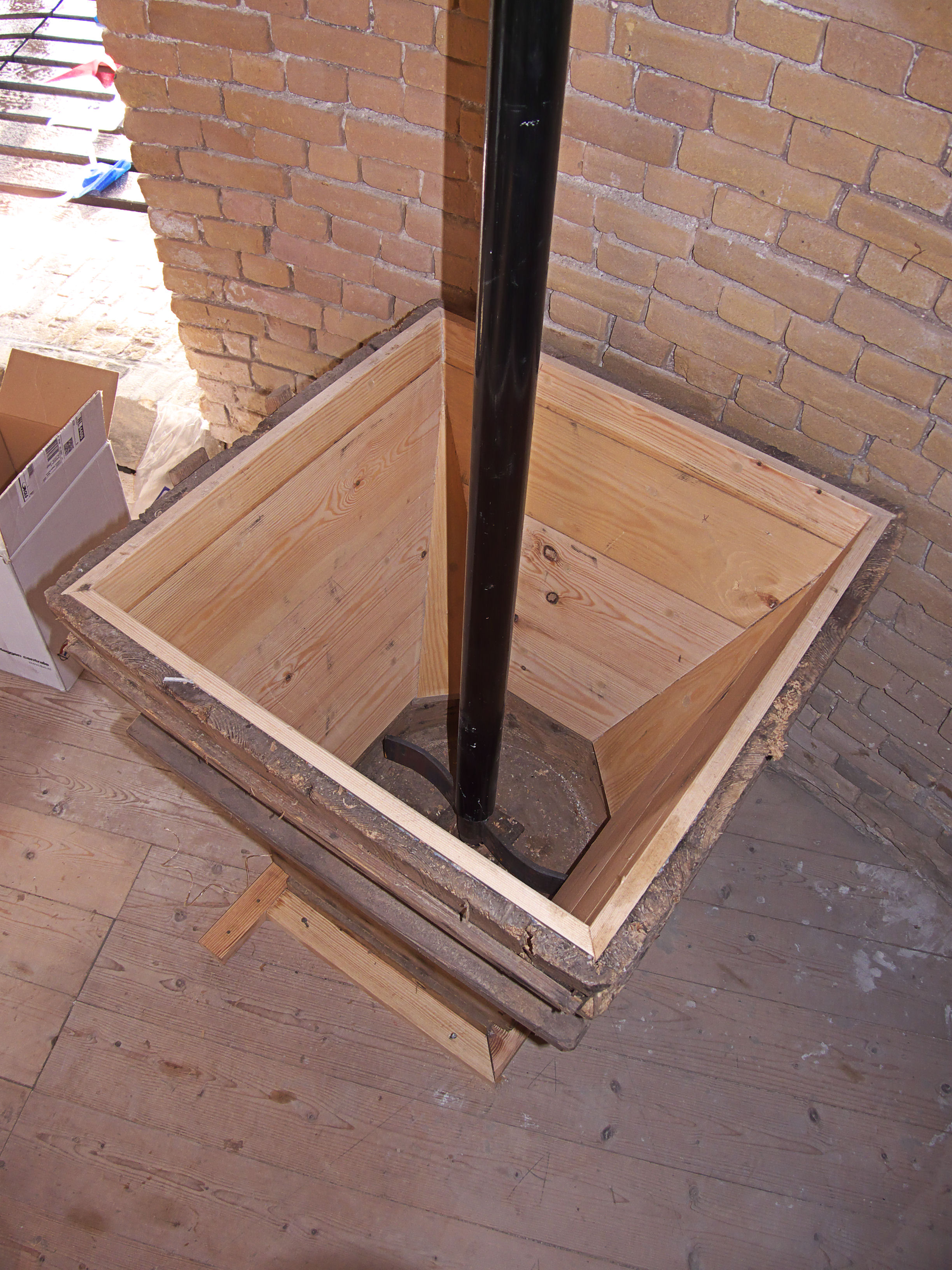 Molen De Korenbloem, Kortgene, tremel voor meel naar buil